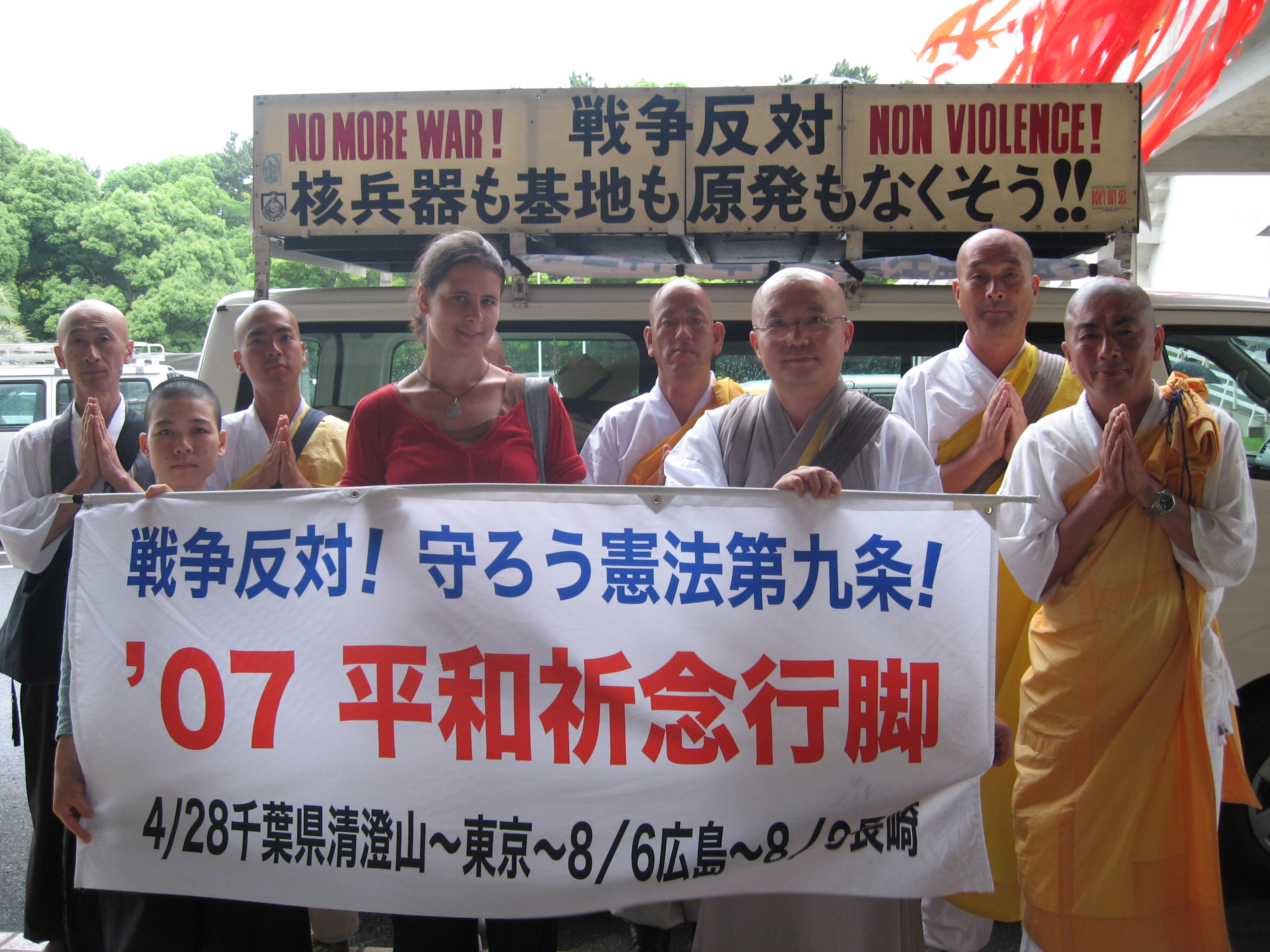 Peacewalk of Nipponzan Myohoji Sekt 2007